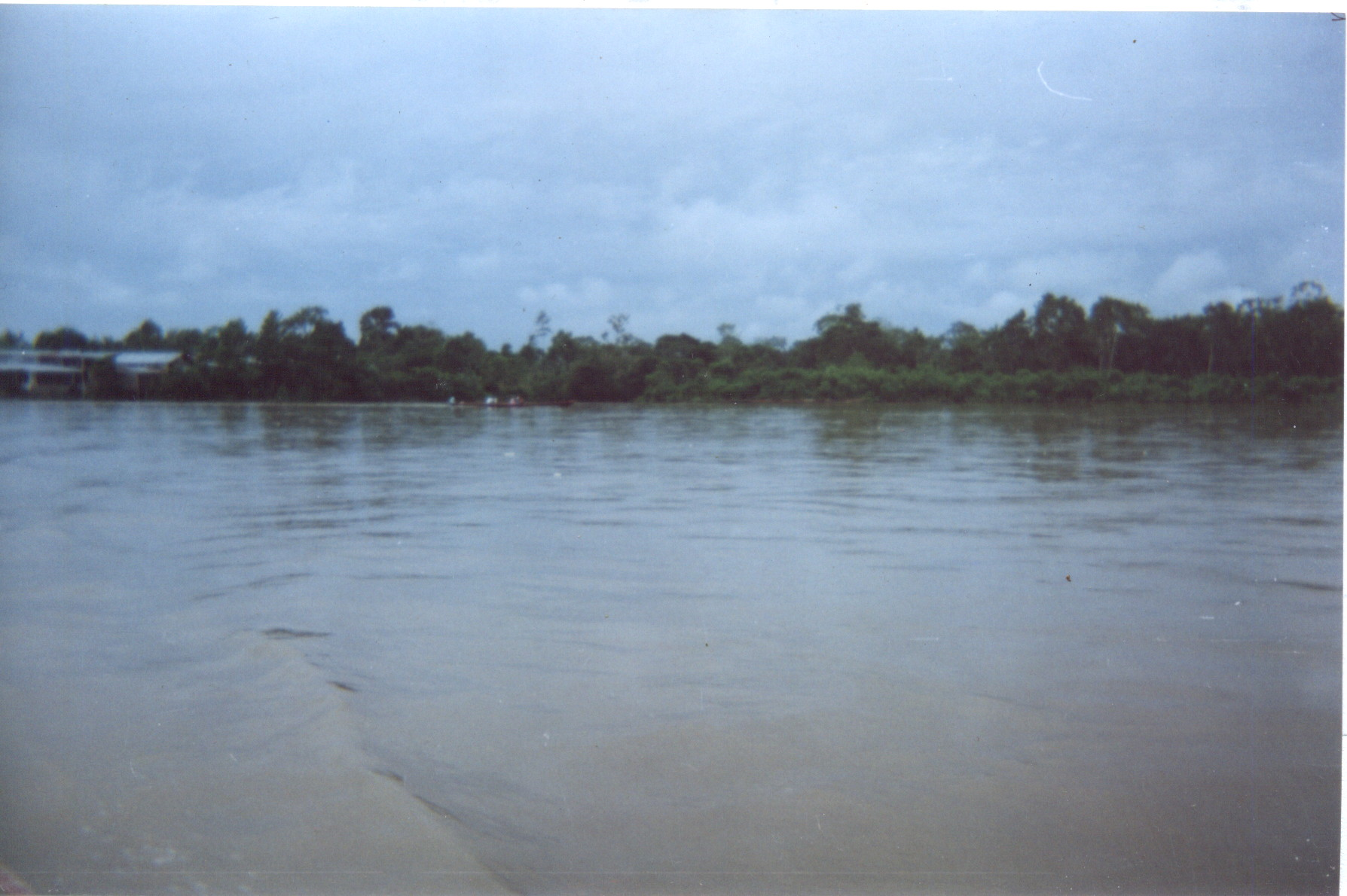 Imagen personal del Rio Putumayo en Puerto Asís